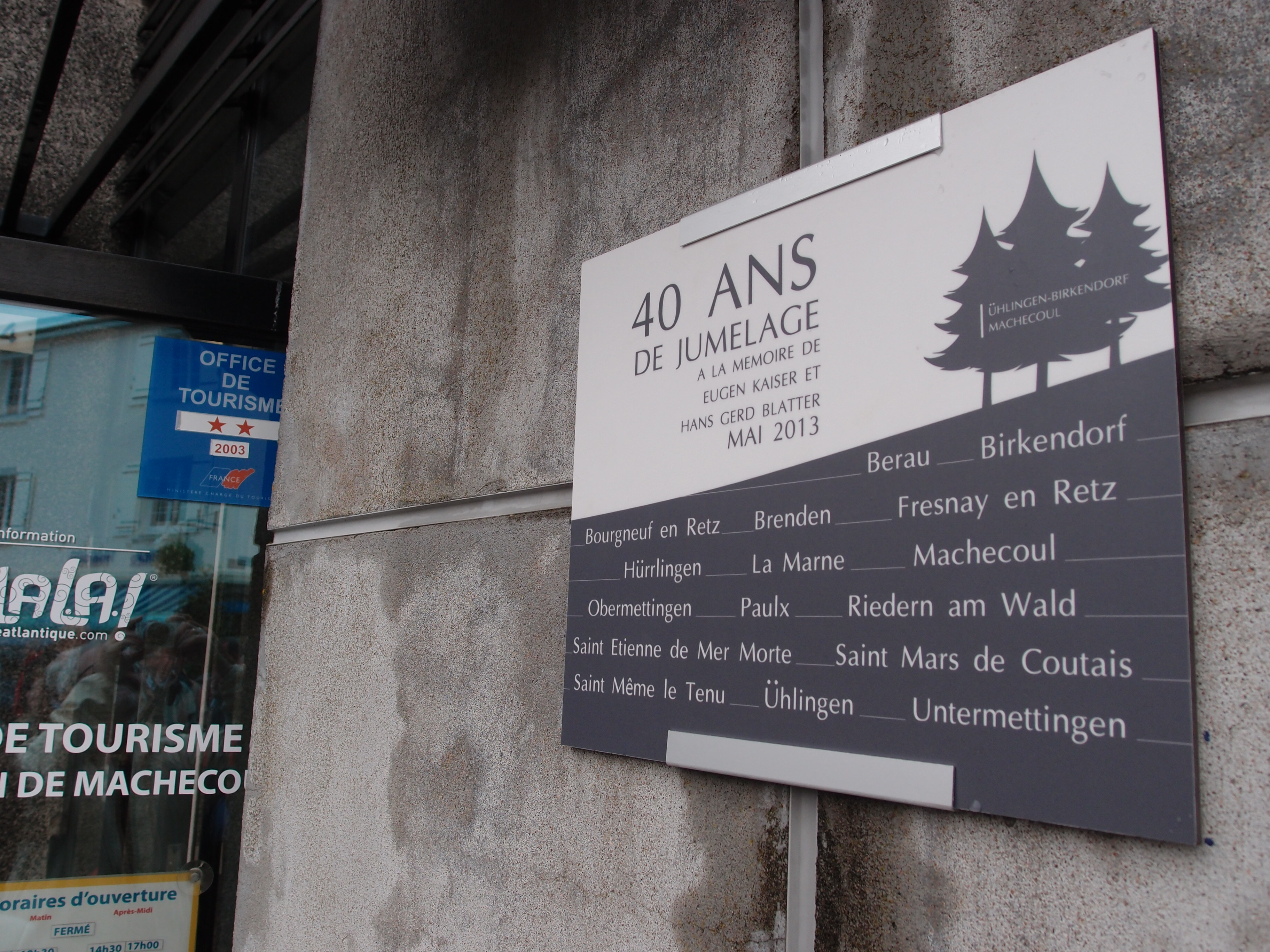 Partnerschaft Gemeinde Ühlingen-Birkendorf mit Machecoul/Frankreich, 40-jähriges Bestehen